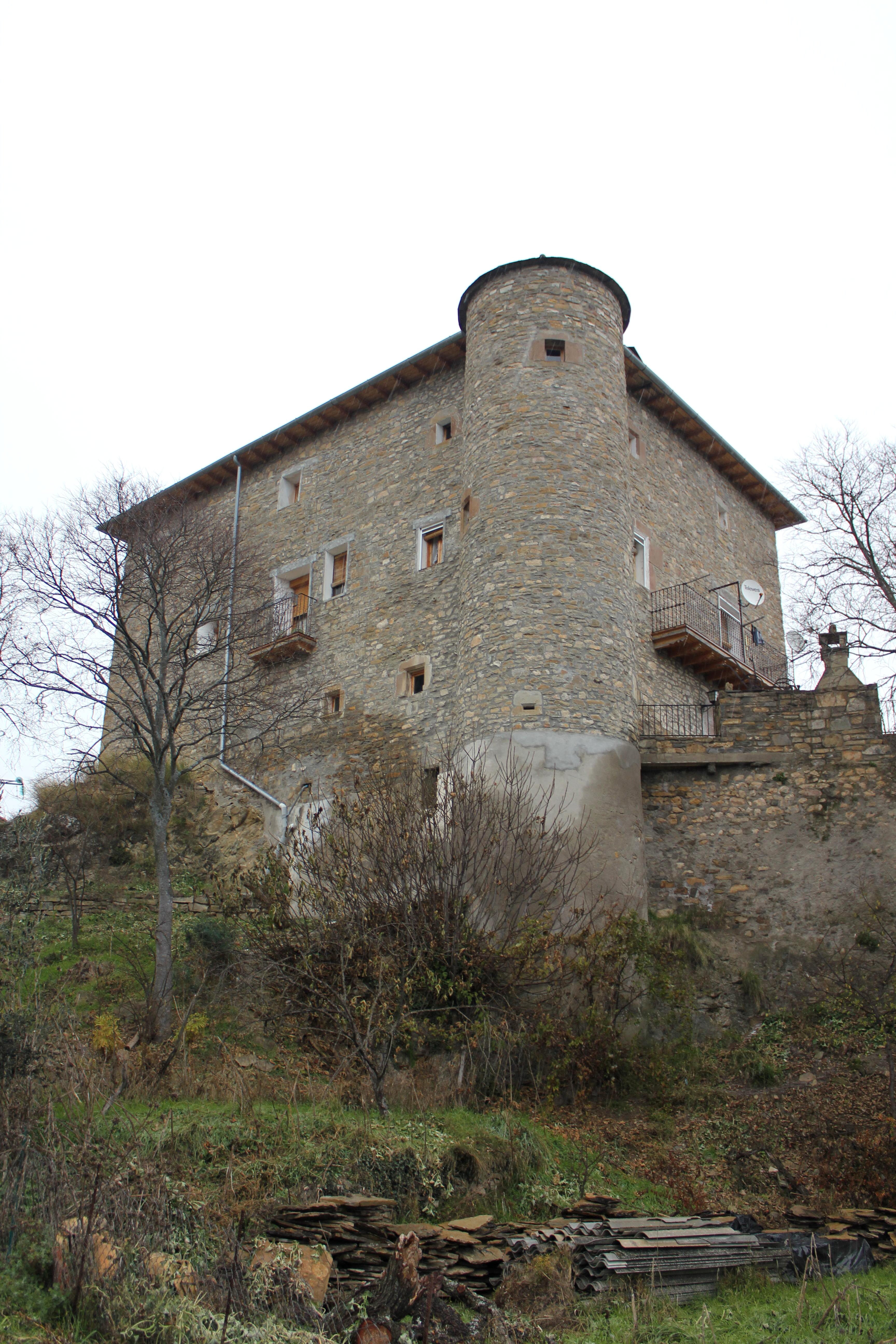 Aragonés: Casa Palacio, en Salinas de Trillo (A Fueva, Sobrarbe).